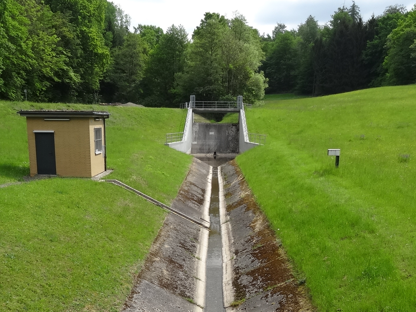 Niddastausee